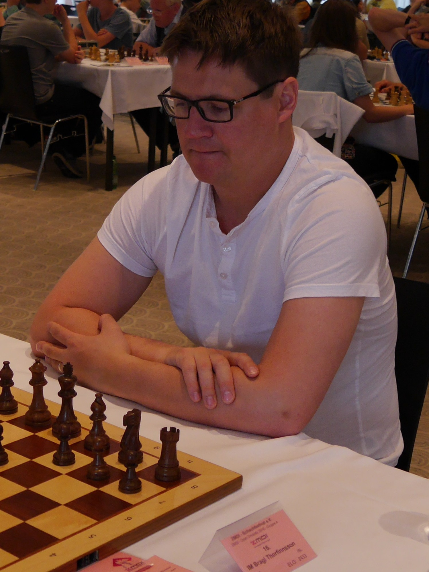 Bragi Thorfinnsson, ZMDI Schachfestival 2016 in Dresden.